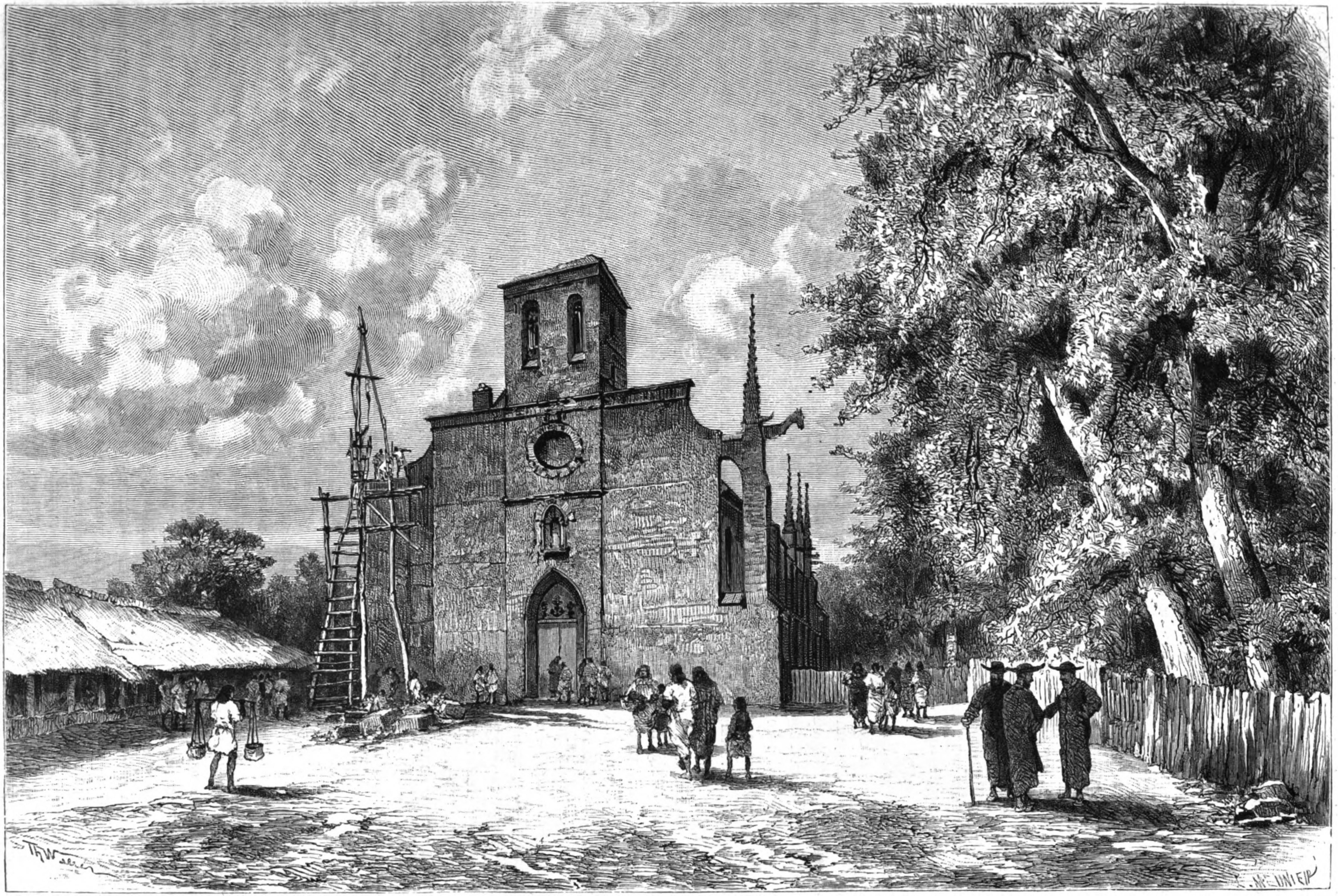 Gravure montrant l'église de Mu'a, au sud de Wallis, d'après une photographie. Vue actuelle de l'église : Template:Wls